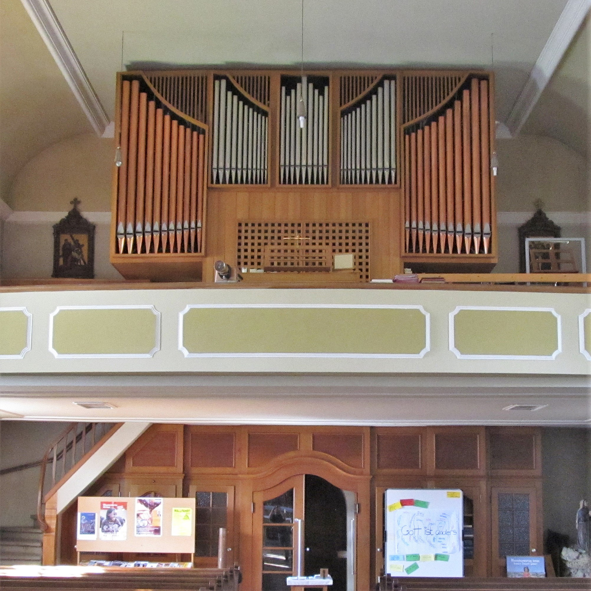 Blick ins Innere der katholischen Pfarrkirche St. Margaretha in Bebelsheim, Gemeinde Mandelbachtal, Saarland